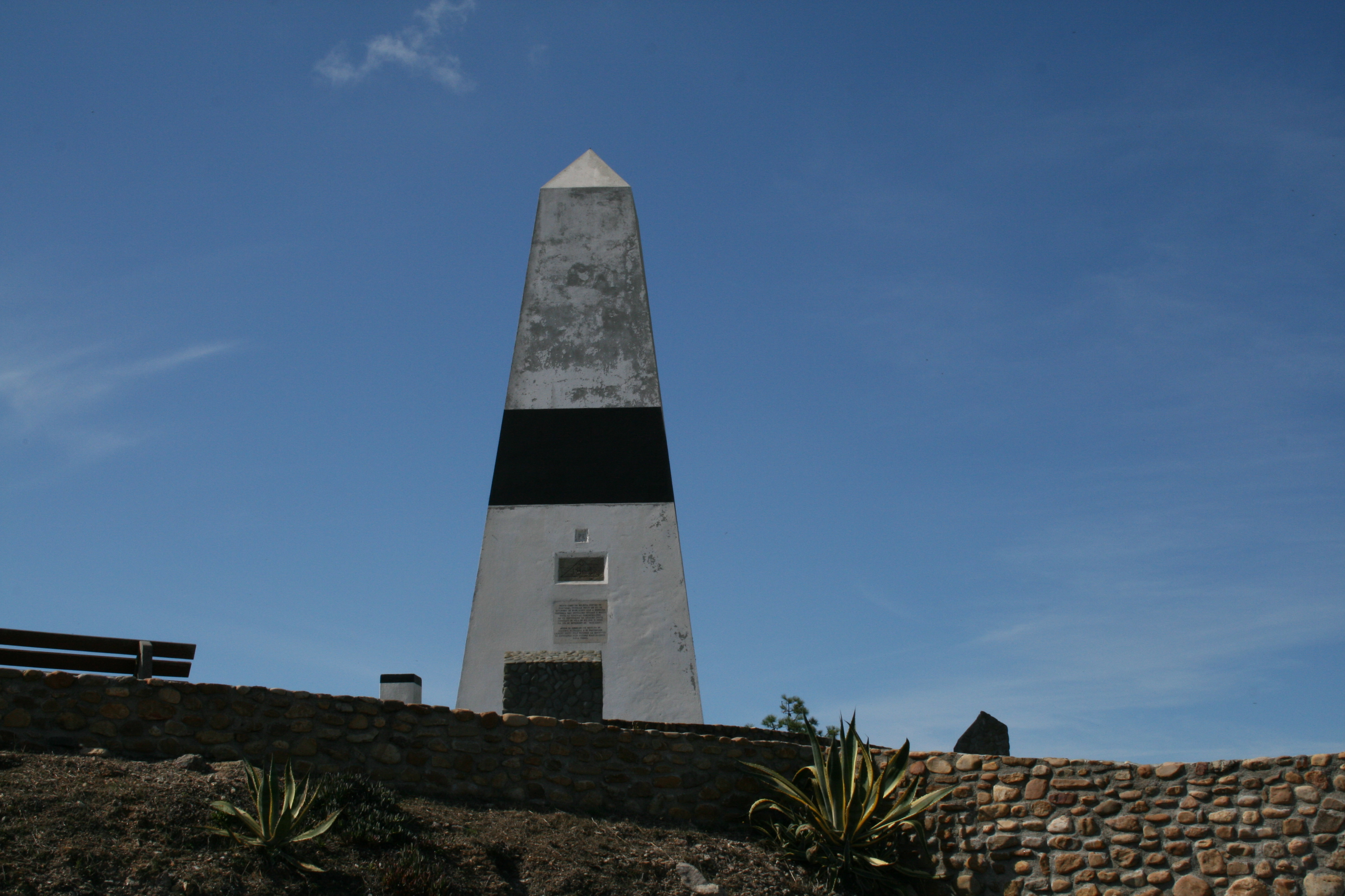 Picoto da Melrica: centro geodésico de Portugual